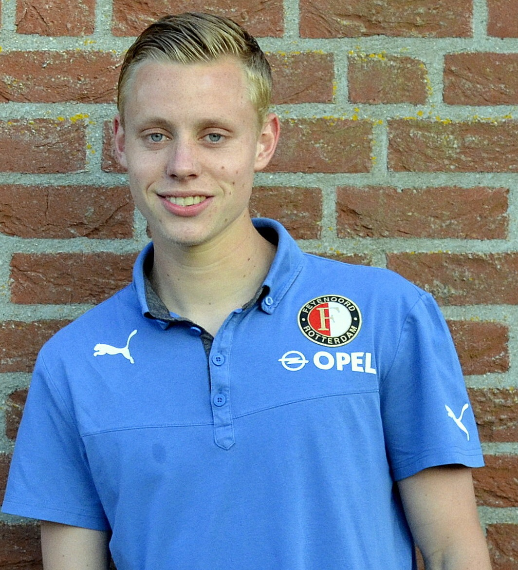 Rick Dekker maakte toen nog deel uit van Feyenoord O19 en is daarna naar PEC Zwolle gegaan.